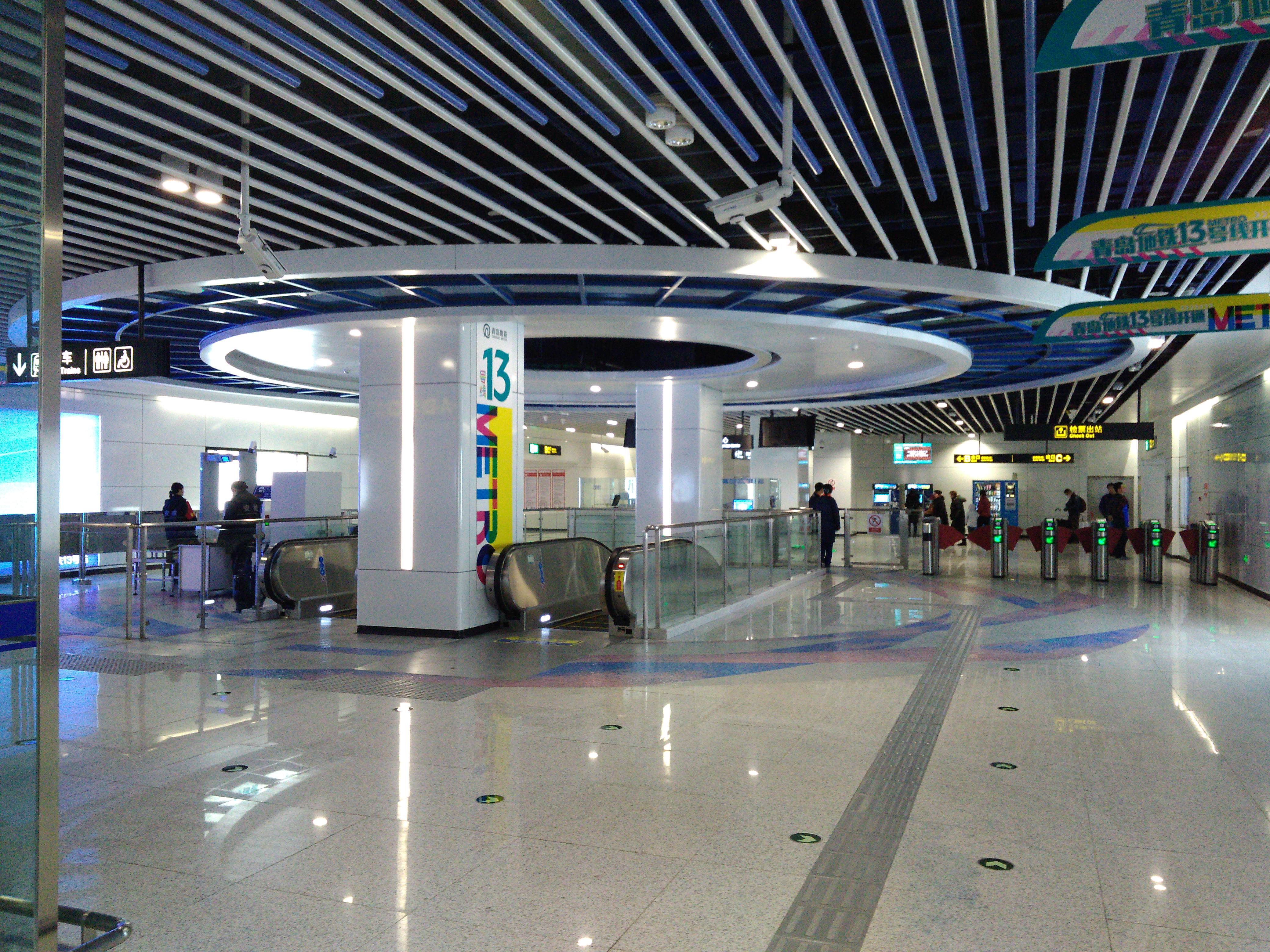 朝阳山路站站厅